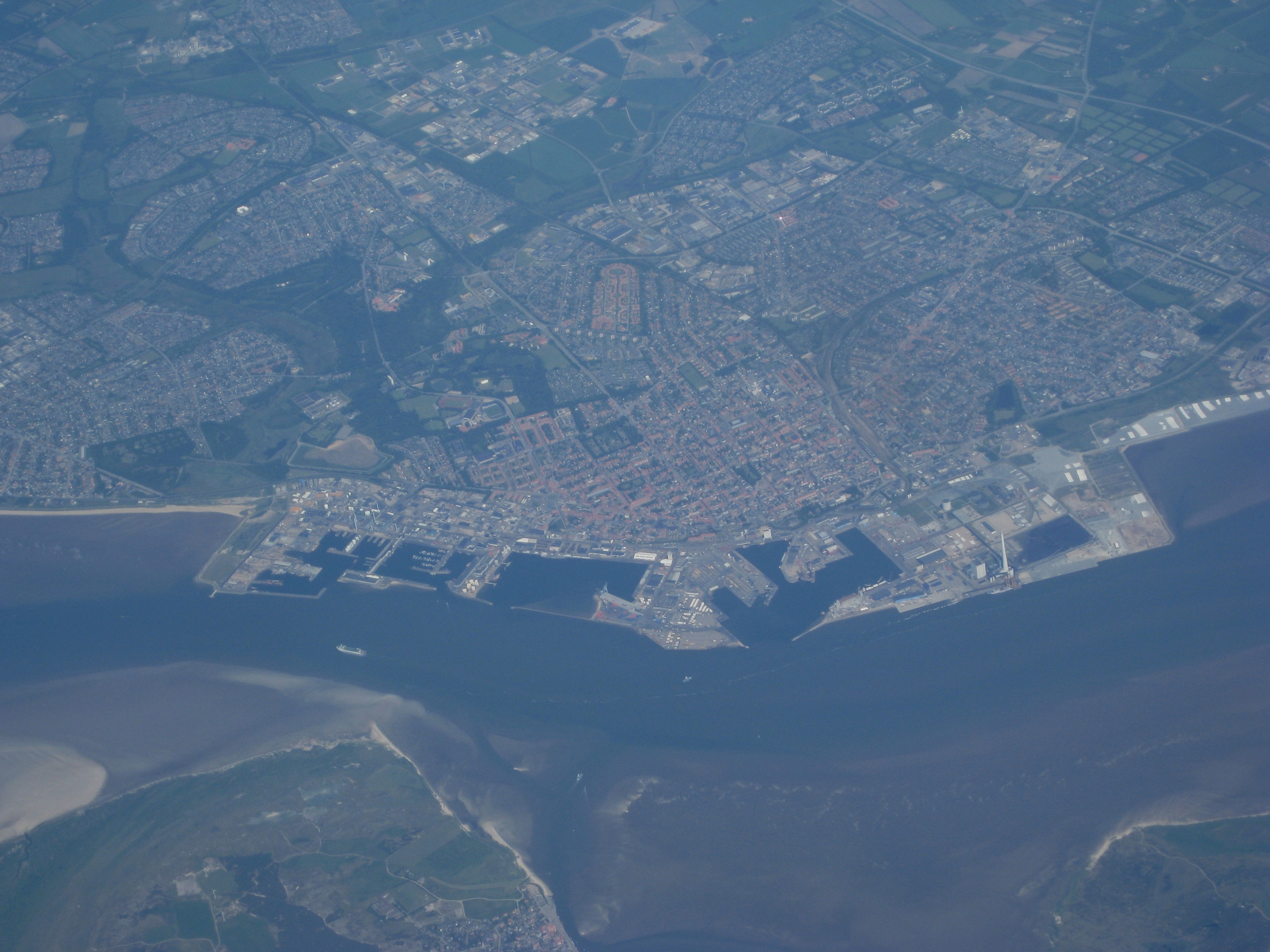 Esbjerg set fra syd.